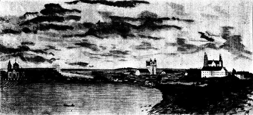 Беларуская (тарашкевіца): Глыбокае (Hłybokaje), з боку возера Кагальнае (Kahalnaje)